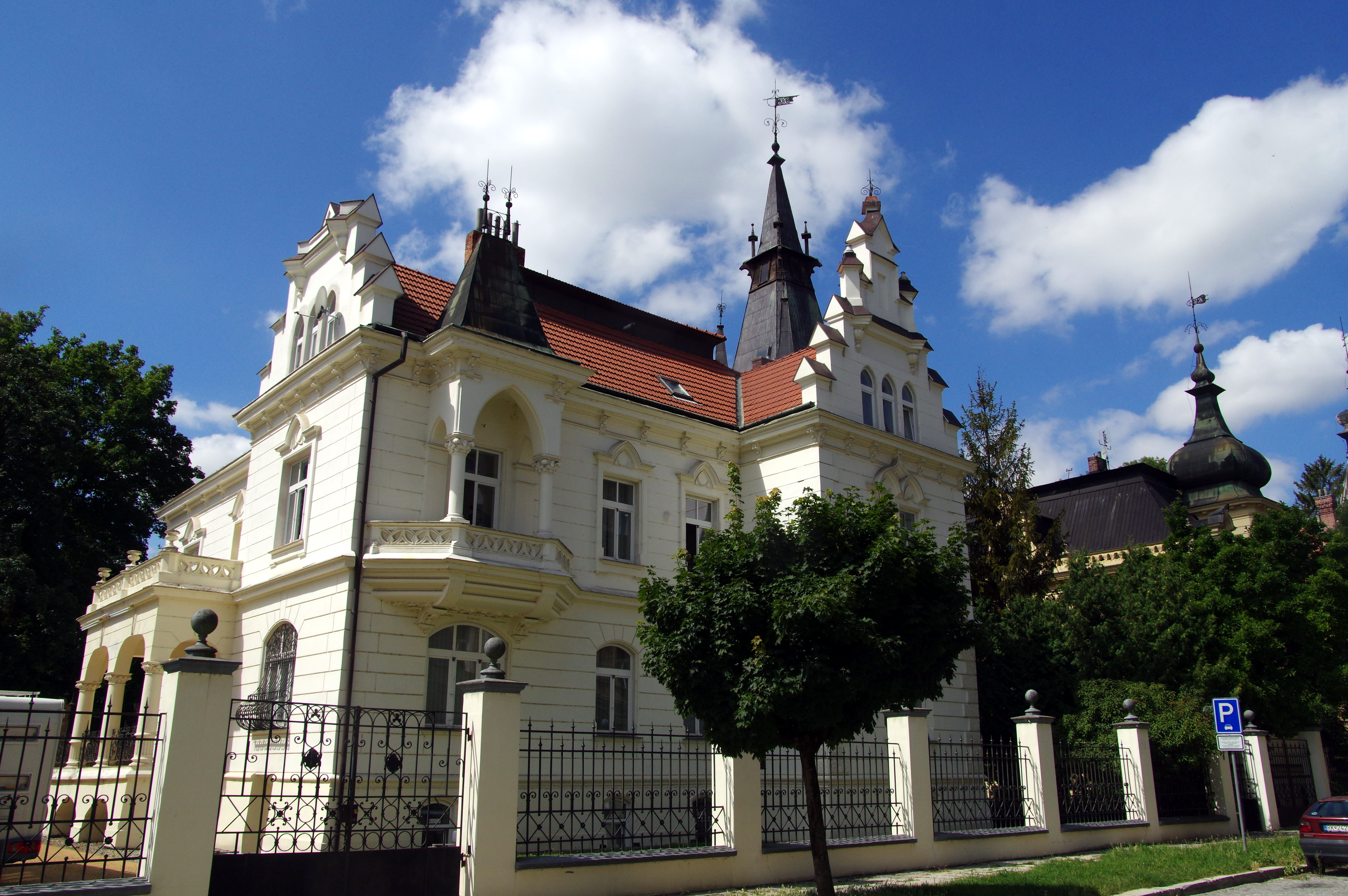 Vídeňská 635/8, Olomouc